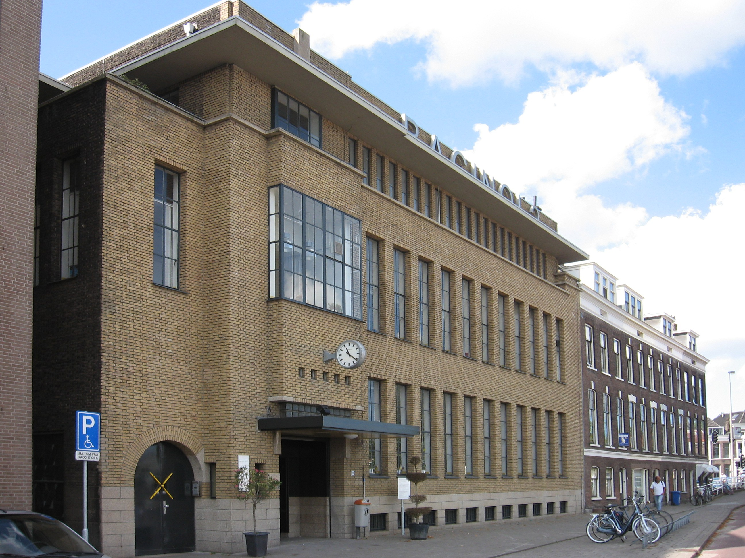 Delft - Bacinol 2.jpg